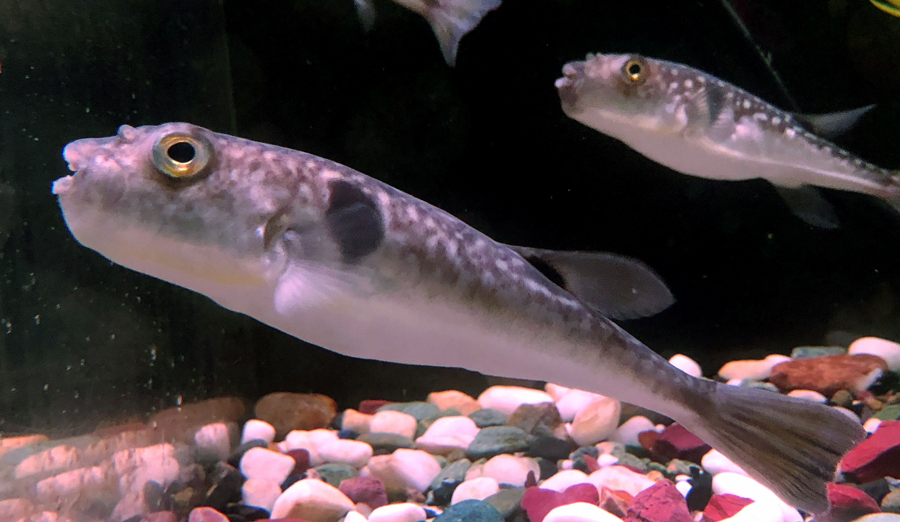 マフグ。稚内市立ノシャップ寒流水族館にて。